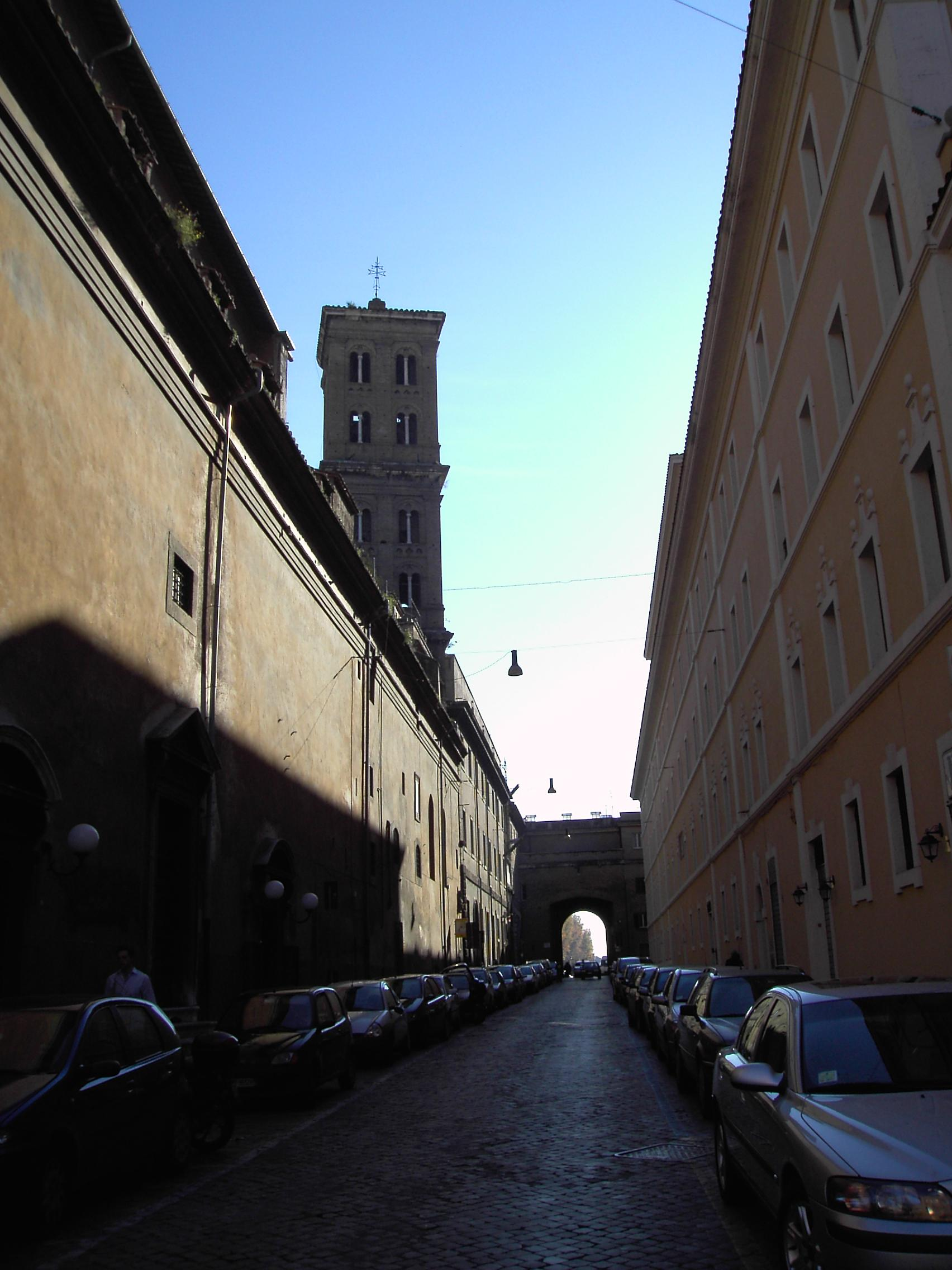 Roma, Borgo: Porta Santo Spirito e via dei Penitenzieri.